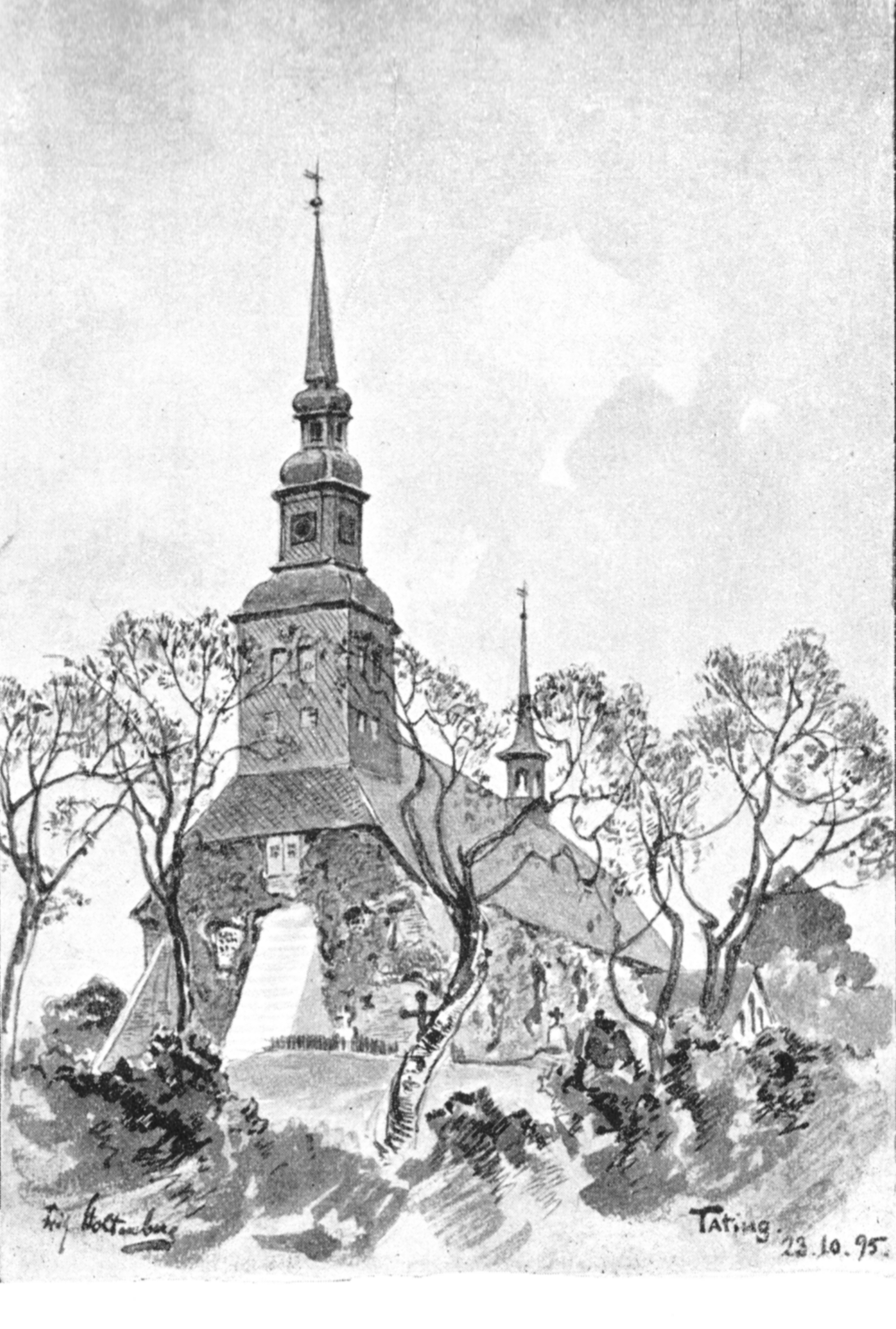 Die St.-Magnus-Kirche in Tating, Zeichnung von Fritz Stoltenberg